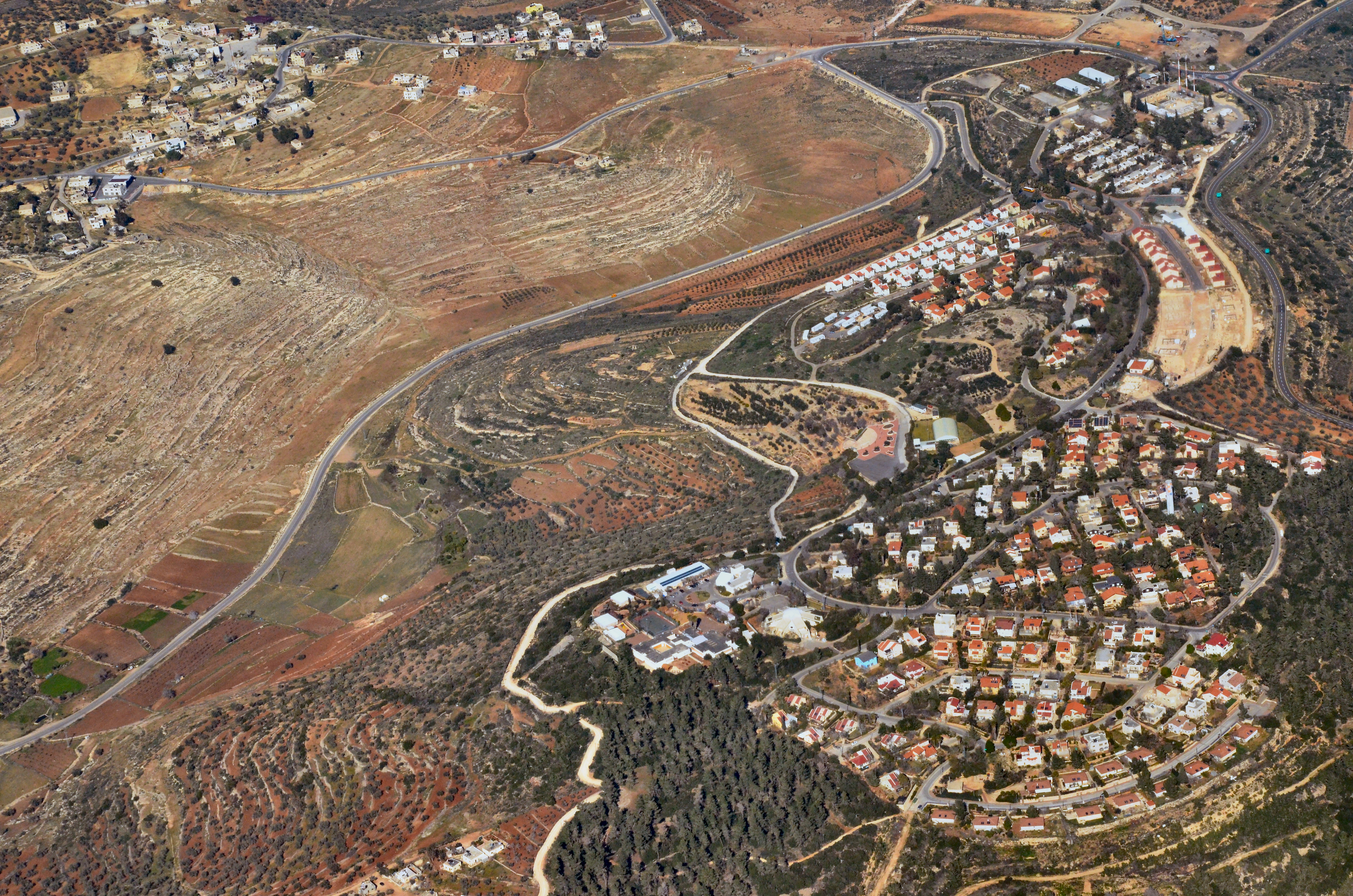 נוה צוף (חלמיש) ונבי סלאח